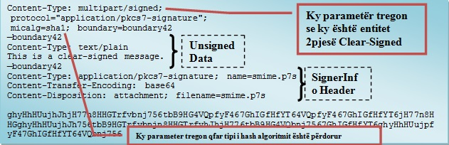 Shembulli S/MIME